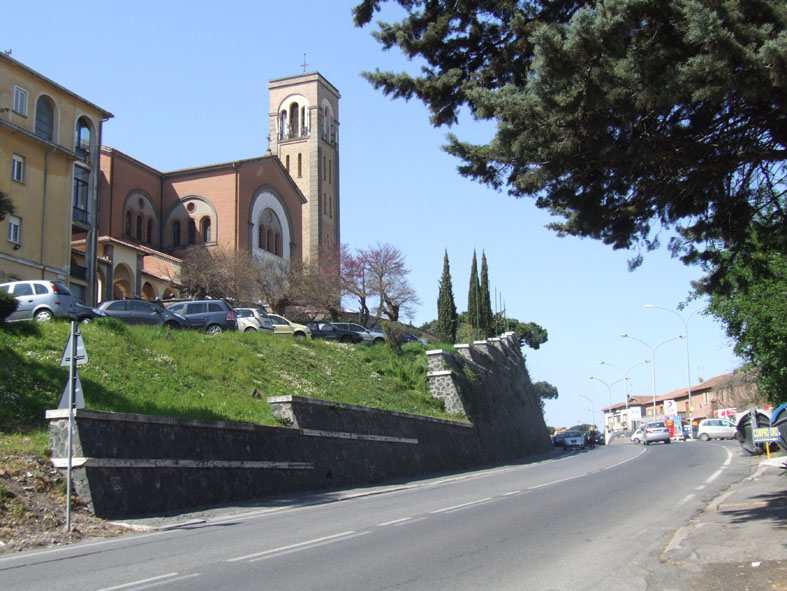 La Storta, Roma, Cattedrale dei Sacri Cuori di Gesù e Maria (sede della diocesi di Porto-Santa Rufina (sulla via Cassia).